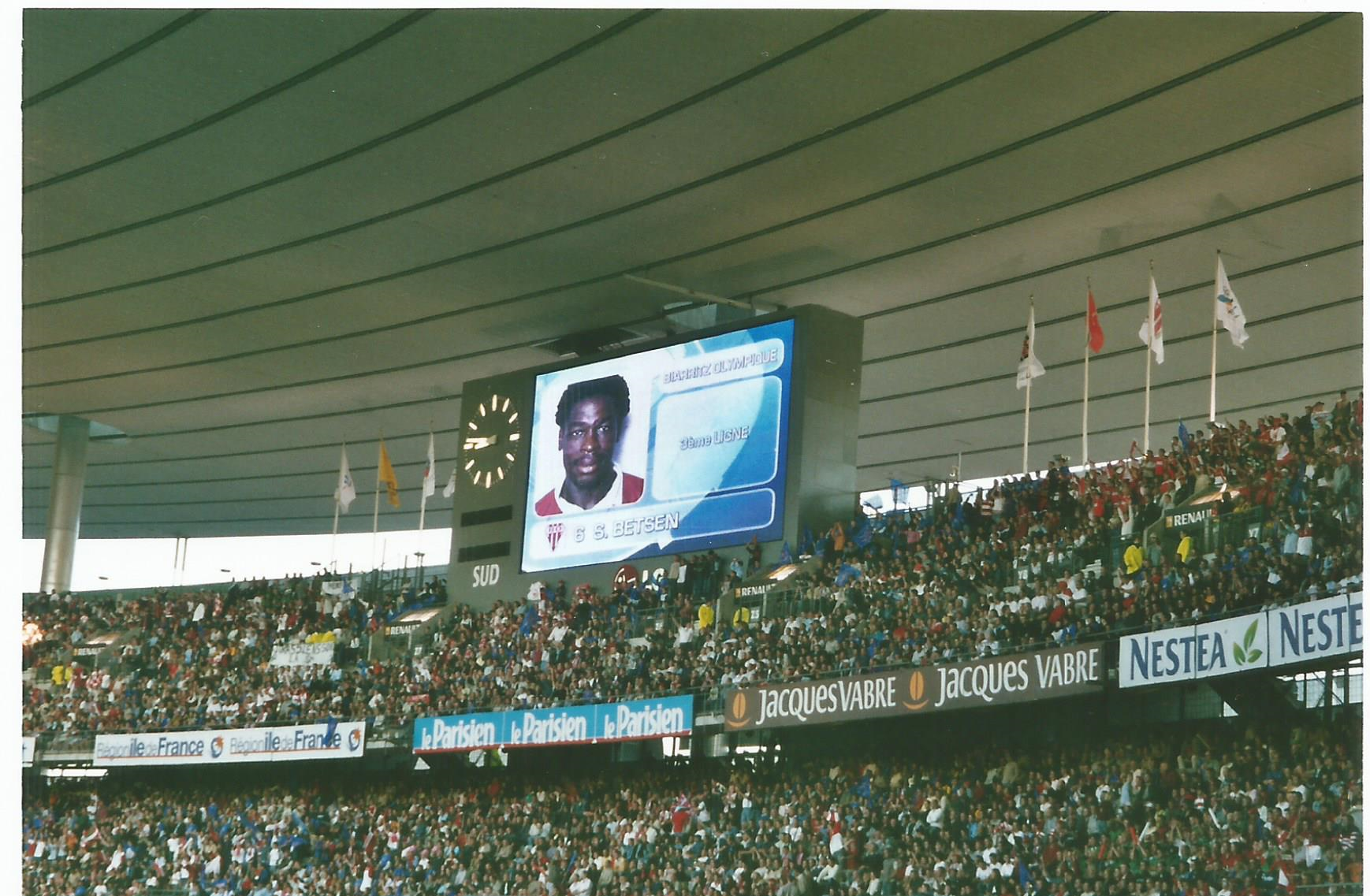 Panneau d'affichage présentant Serge Betsen